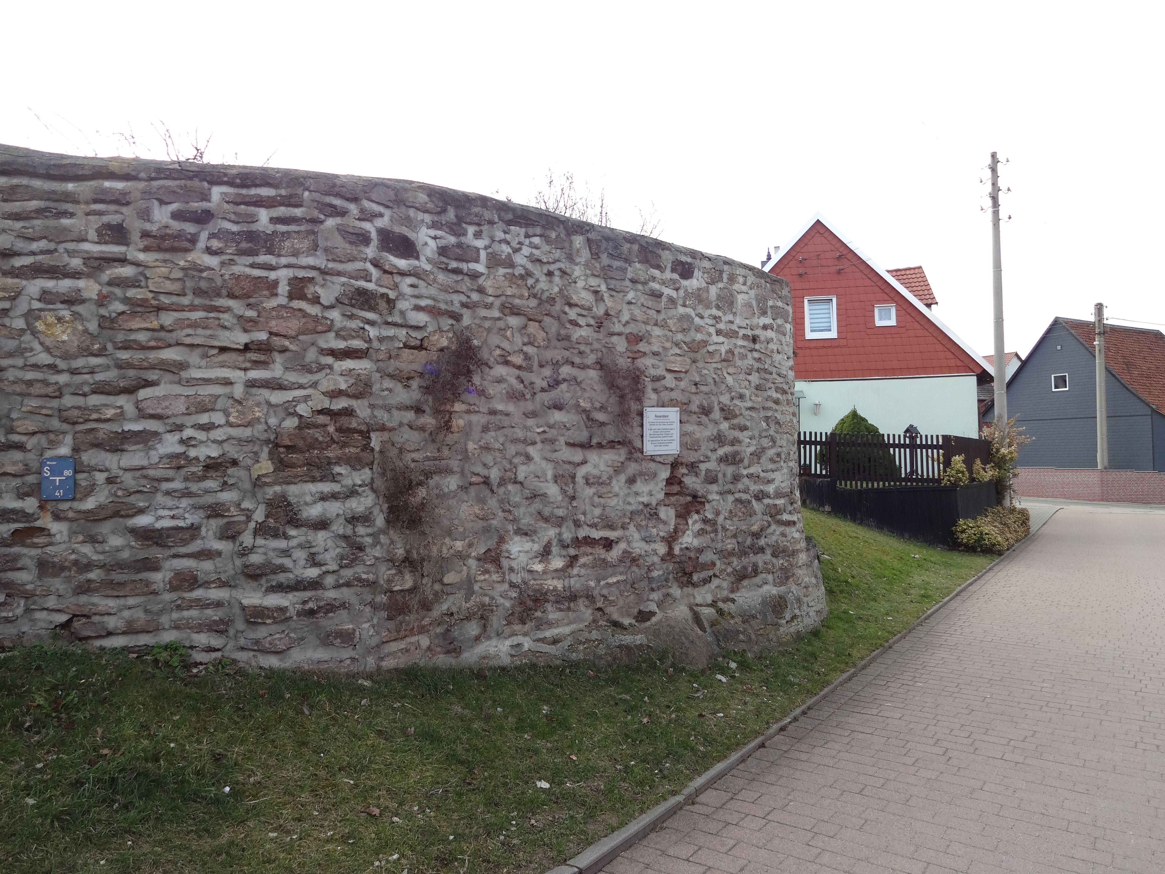 Denkmalgeschützte Mauer in der Schulstraße 1 in Benzingerode (Ortsteil von Wernigerode)